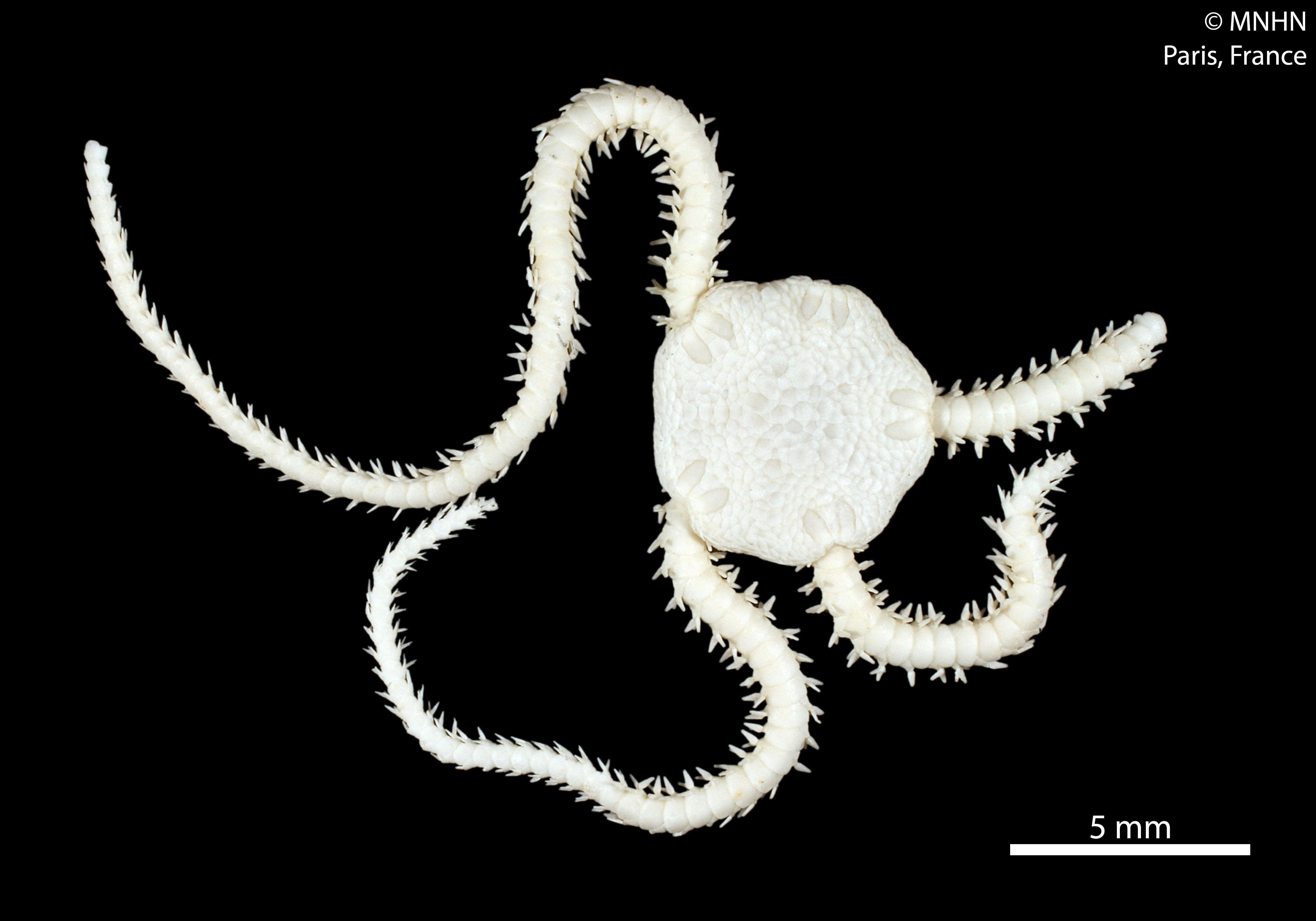 Amphiura cherbonnieriSpécimen MNHN-IE-2013-10135Collection : Échinodermes (IE)Muséum National d'Histoire Naturelle (Paris, France) Origine : Libellé du pays : MEDITERRANEE Localité/Lieu-dit : S-E du Cap Creus Numéro de station : B.V.136 Profondeur (mètres) : 115